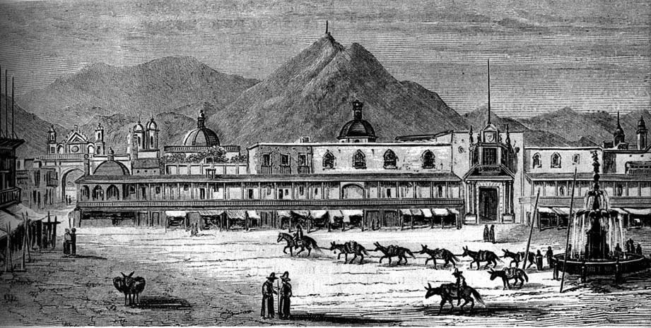 Palacio de los Virreyes, Iglesia de los Desamparados, arco del Triunfo, y Plaza mayor de Lima según un grabado de fines del siglo XVIII. El Palacio de los Virreyes, remozado por el Virrey Velasco, aparece con sus clásicos “Cajones de Ribera” o tenduchos, en uno de cuales se alojó el ingenio de Juan del Valle Caviedes, quien se dedicaba al comercio y tenía un pequeño negocio.